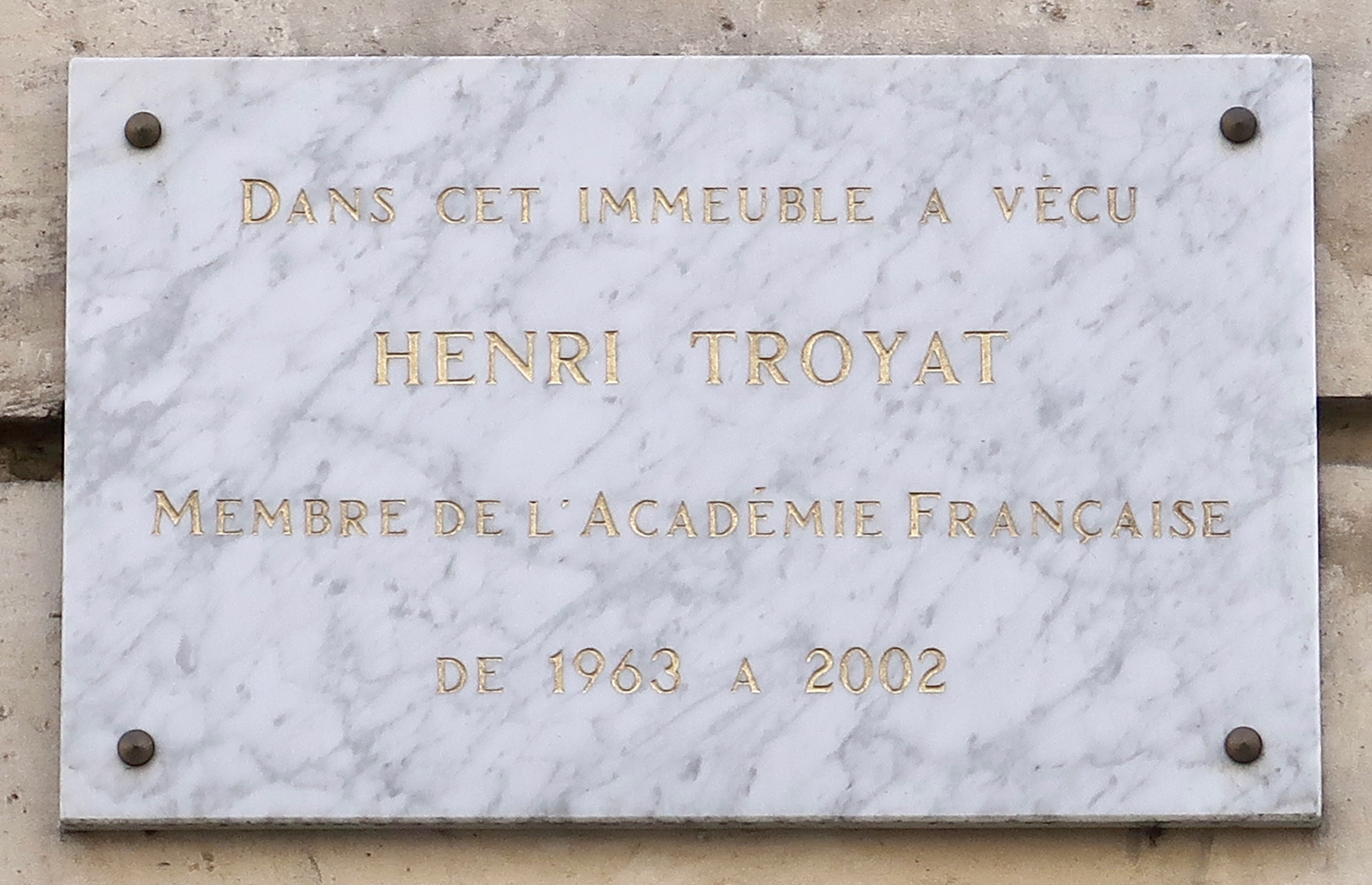 Plaque en hommage à l'écrivain Henri Troyat, 5 rue Bonaparte (Paris, 6e).